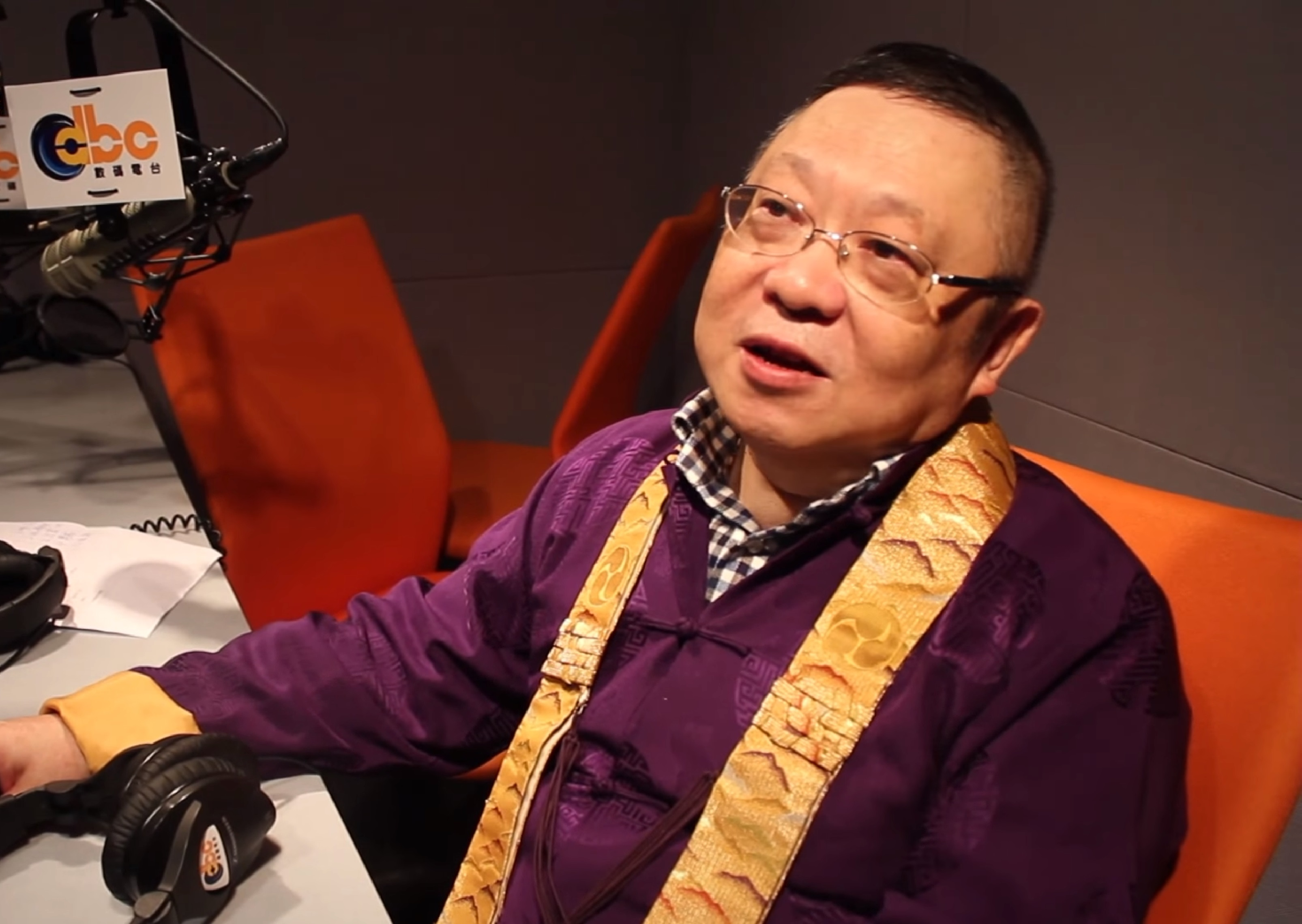 中文（香港）: 香港著名堪輿學家及粵劇編劇